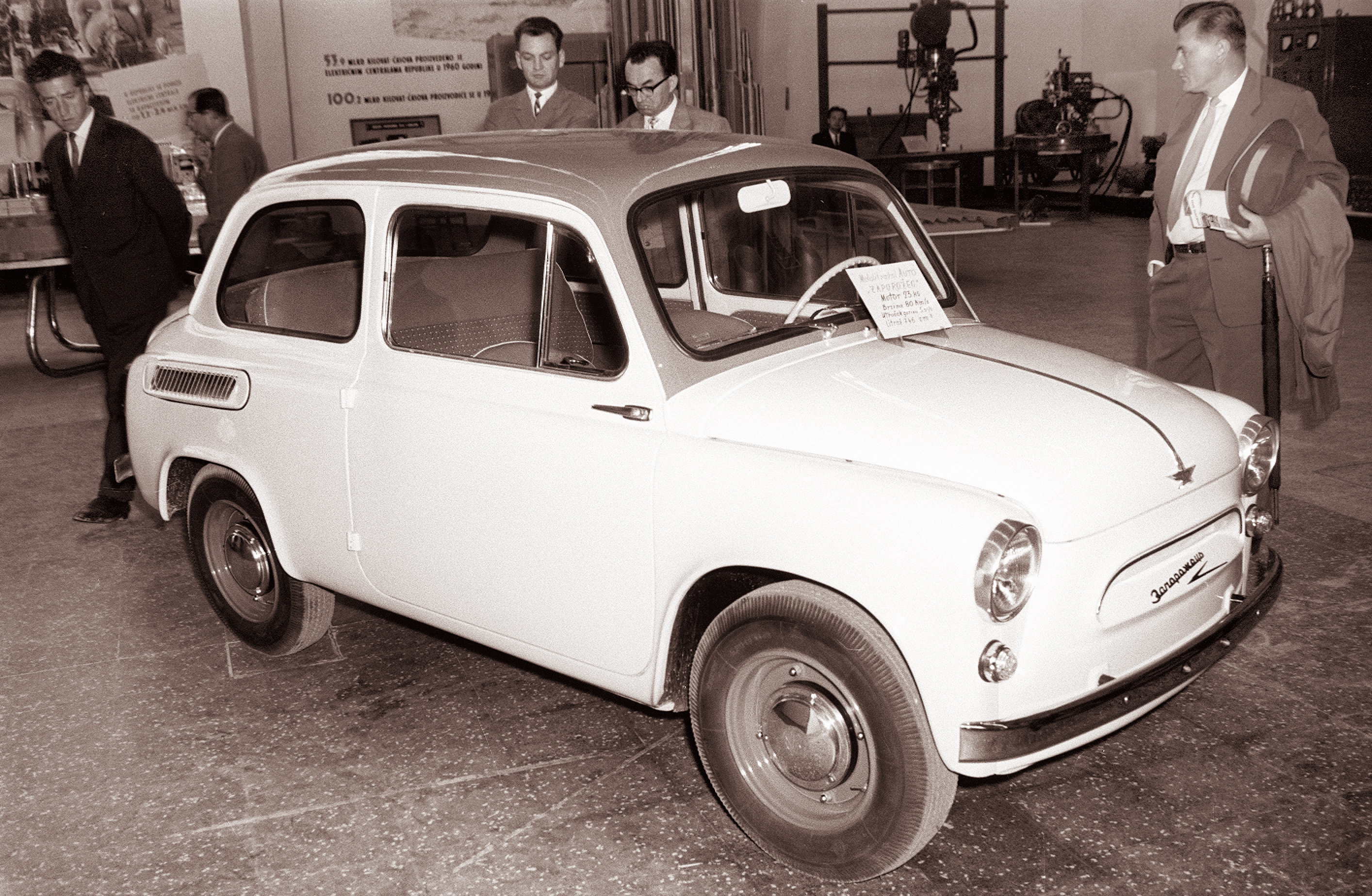 Zaporožec na zagrebškem velesejmu